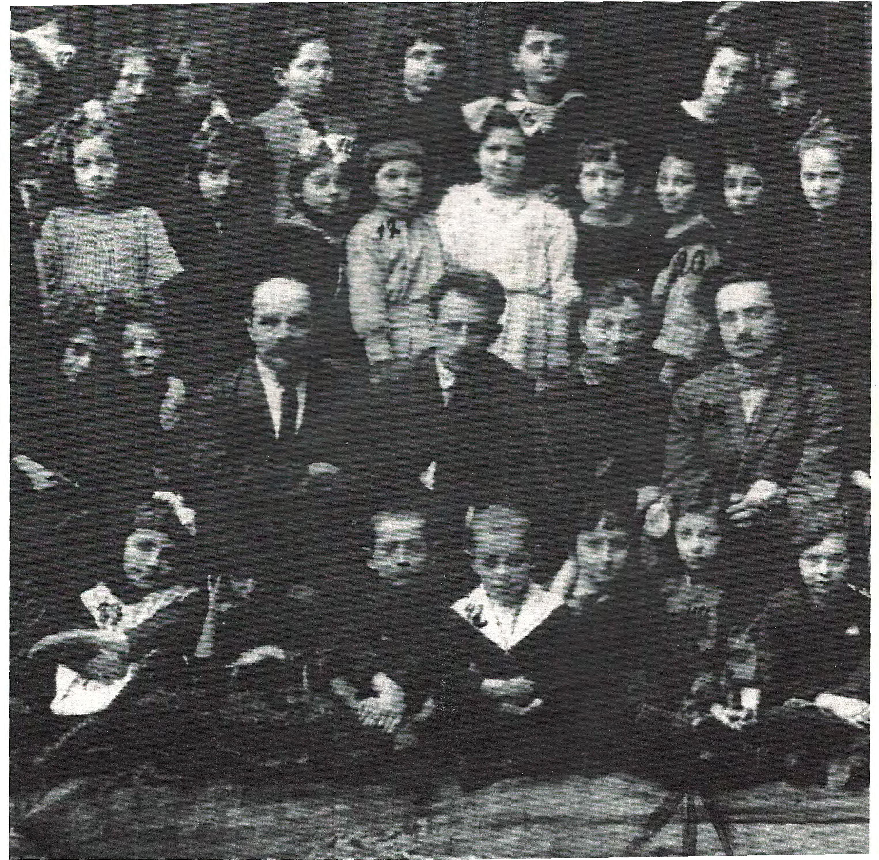 תמונה קבוצתית של תלמידים ומורים, הגימנסיה הריאלית העברית בקובנה